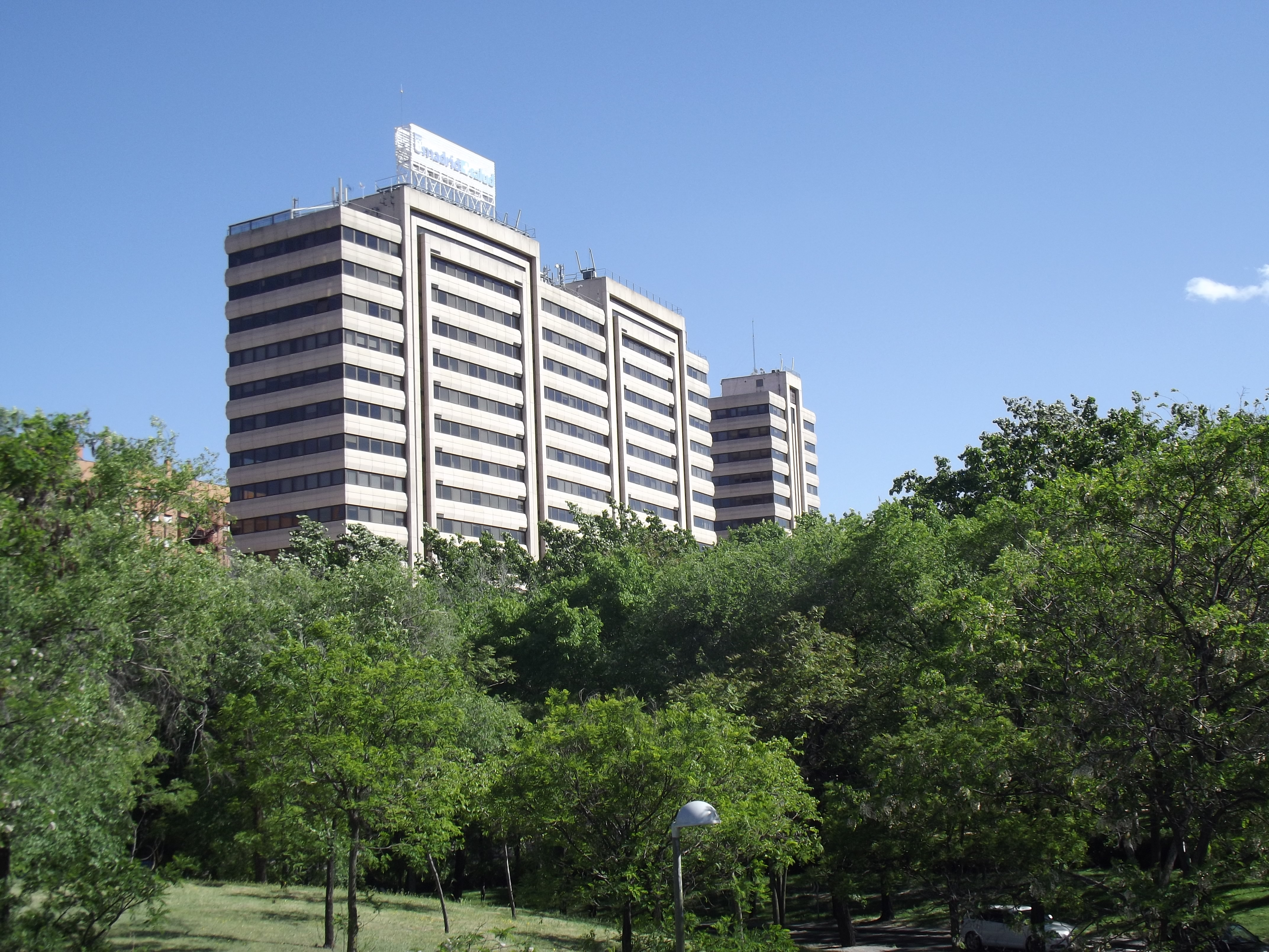 Edificios en Juan Esplandiú 11-13, Madrid.